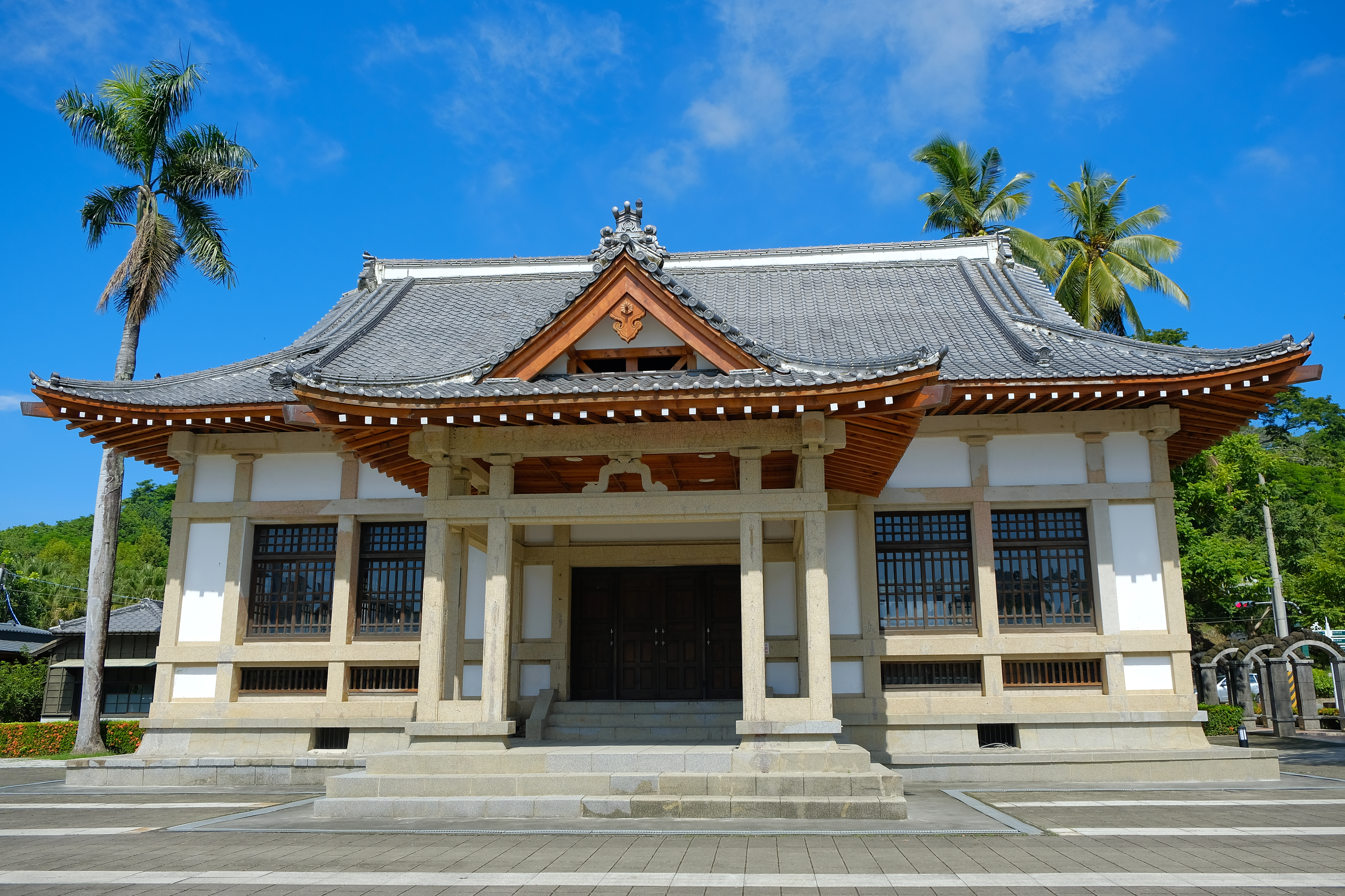 2019 旗山武德殿